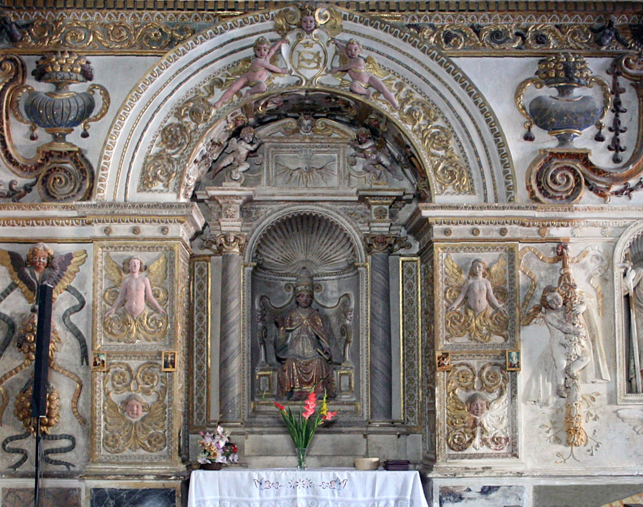 Alanno Chiesa di Santa Maria delle Grazie, Italy